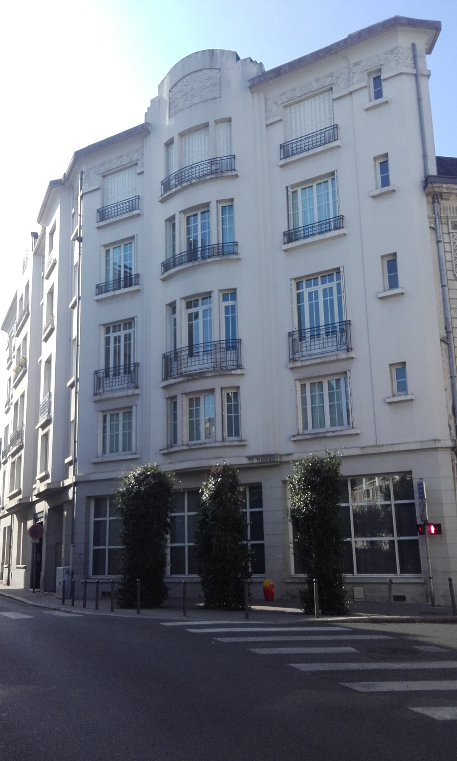 Siège de la Gestapo de Tours pendant l'occupation allemande. 17 rue Georges Sand, Tours